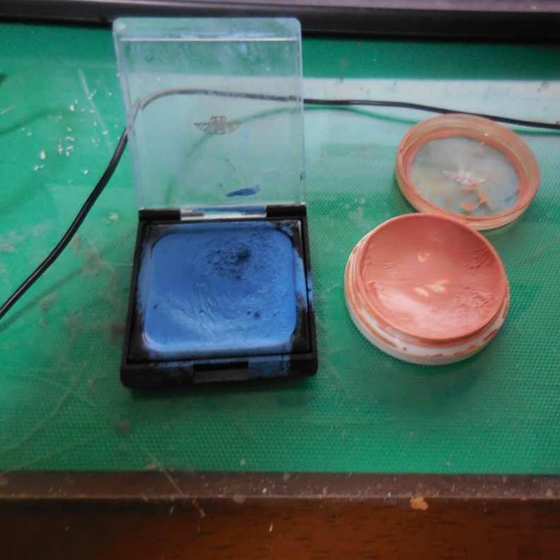 三善のクラウンカラーのブルーとライトニングカラーの25P